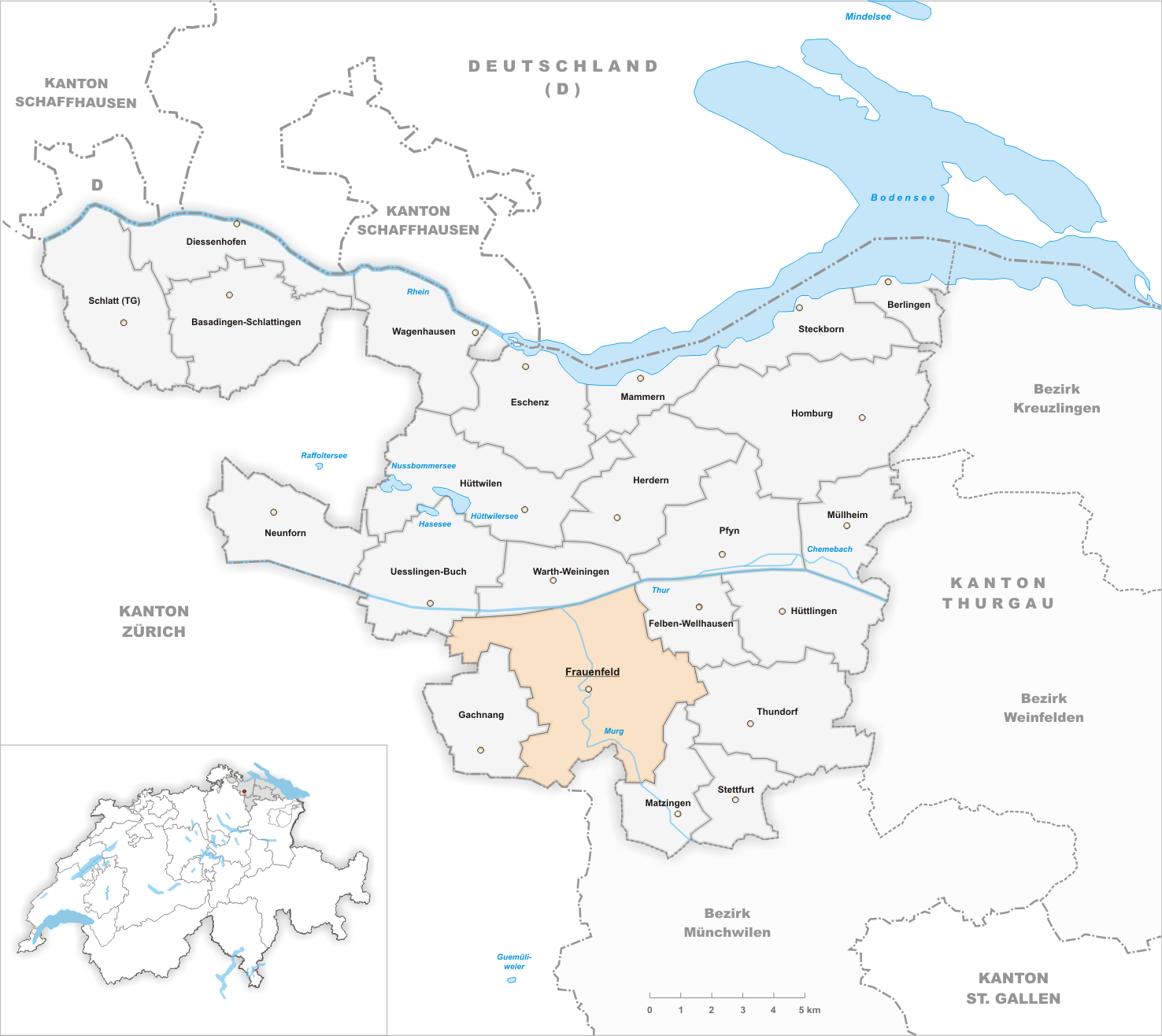 Municipality Frauenfeld